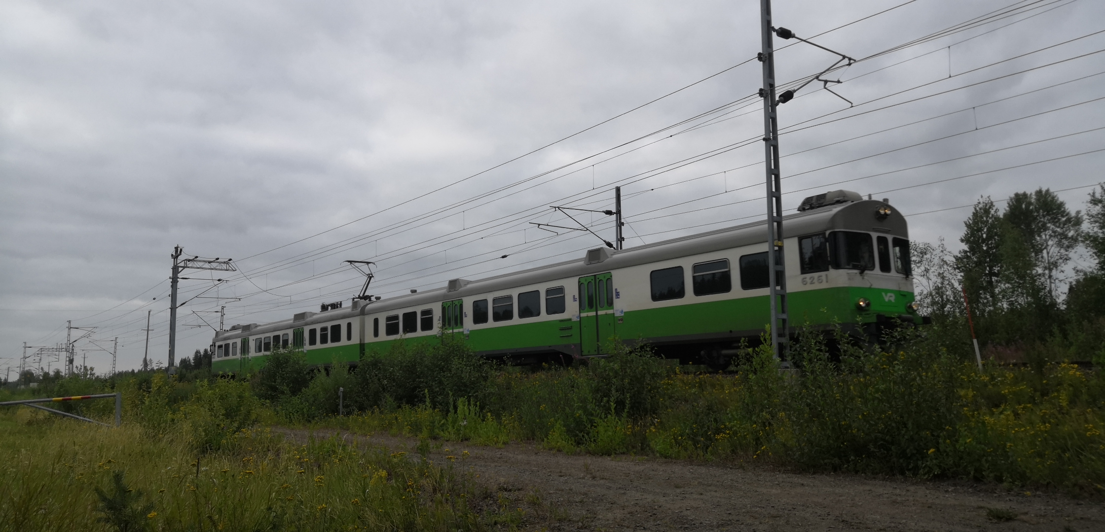 Sm2-juna 6061 Kuusankosken Inginmaalla/Saunamäellä (elokuu 2019)